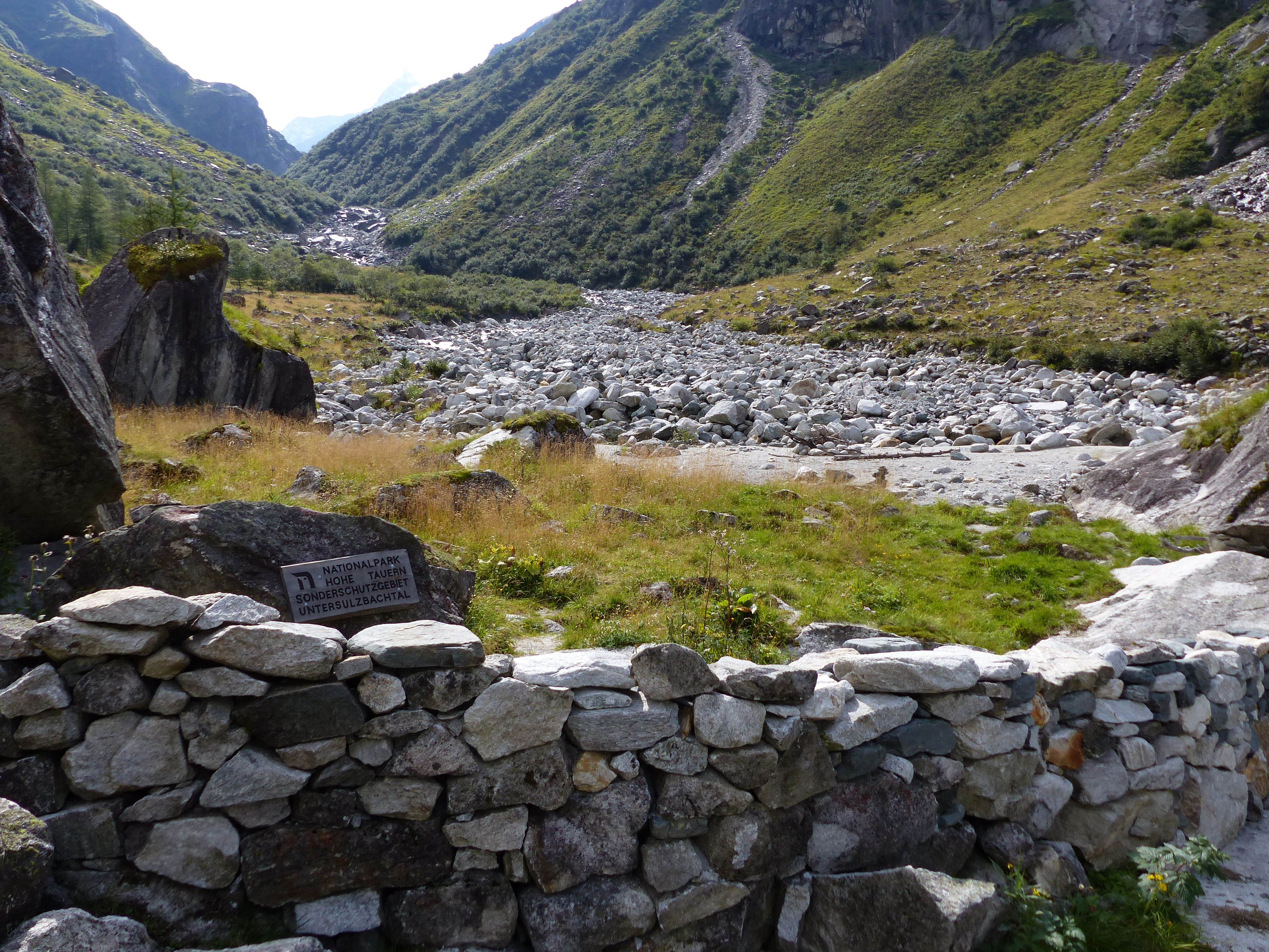 Grenze des Sonderschutzgebietes etwas oberhalb der Ascham Alm